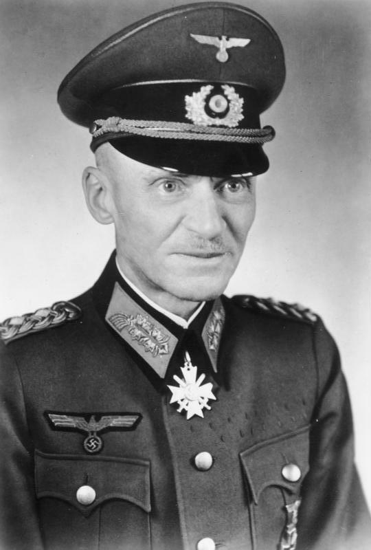 Ehrung für den Organisator des deutschen Aufmarsches Mit der Verleihung des Ritterkreuzes des Kriegsverdienstkreuzes mit Schwertern an General der Infanterie Rudolf Gercke würdigte der Führer die hohen Verdienste, die sich General Gercke um den Aufbau des militärischen Transportwesens erworben hat. Seit Kriegsausbruch hat er sodann als Chef des Transportwesens den Ablauf des Aufmarsches der deutschen Wehrmacht massgebend gesteuert und unter Überwindung aller organisatorischen und technischen Schwierigkeiten später in den besetzten Gebieten die Wiederherstellung der Eisenbahnen und sonstigen Verkehrswege organisiert und durch Erhaltung und Vergrößerung ihrer Leistungsfähigkeit wichtige Voraussetzungen für die rasche Durchführung operativer Massnahmen geschaffen. 4844-43 2.10.43 [Herausgabedatum]